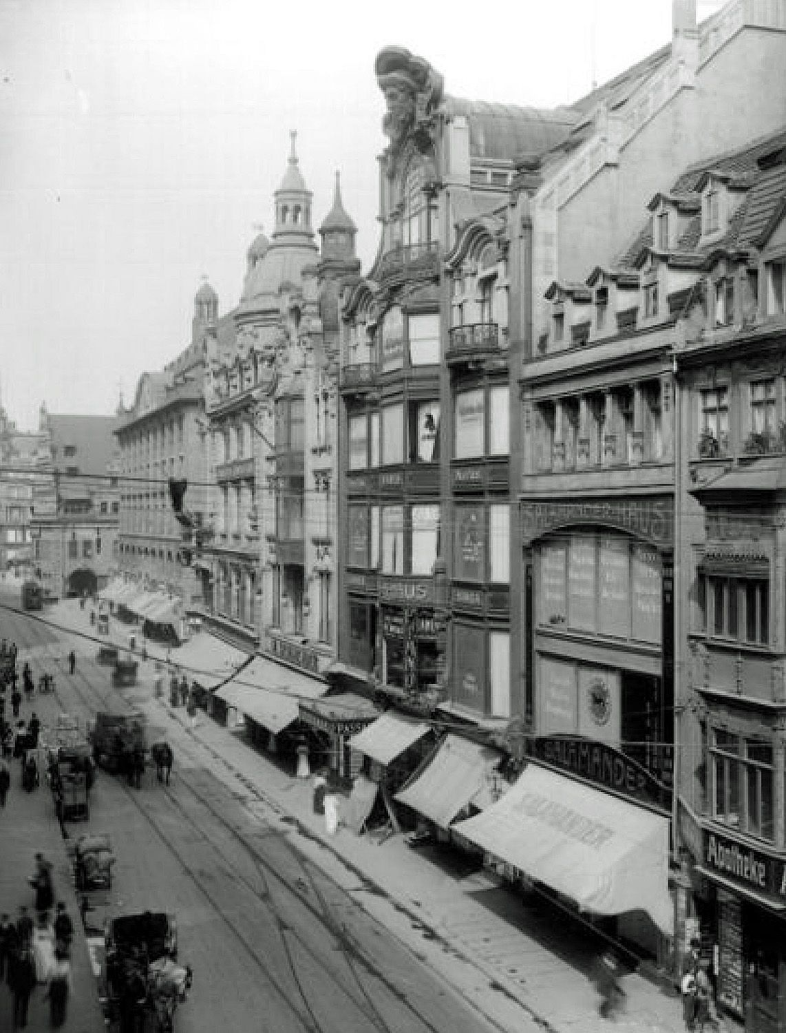 Die Nordseite der Grimmaischen Straße in Leipzig um 1917